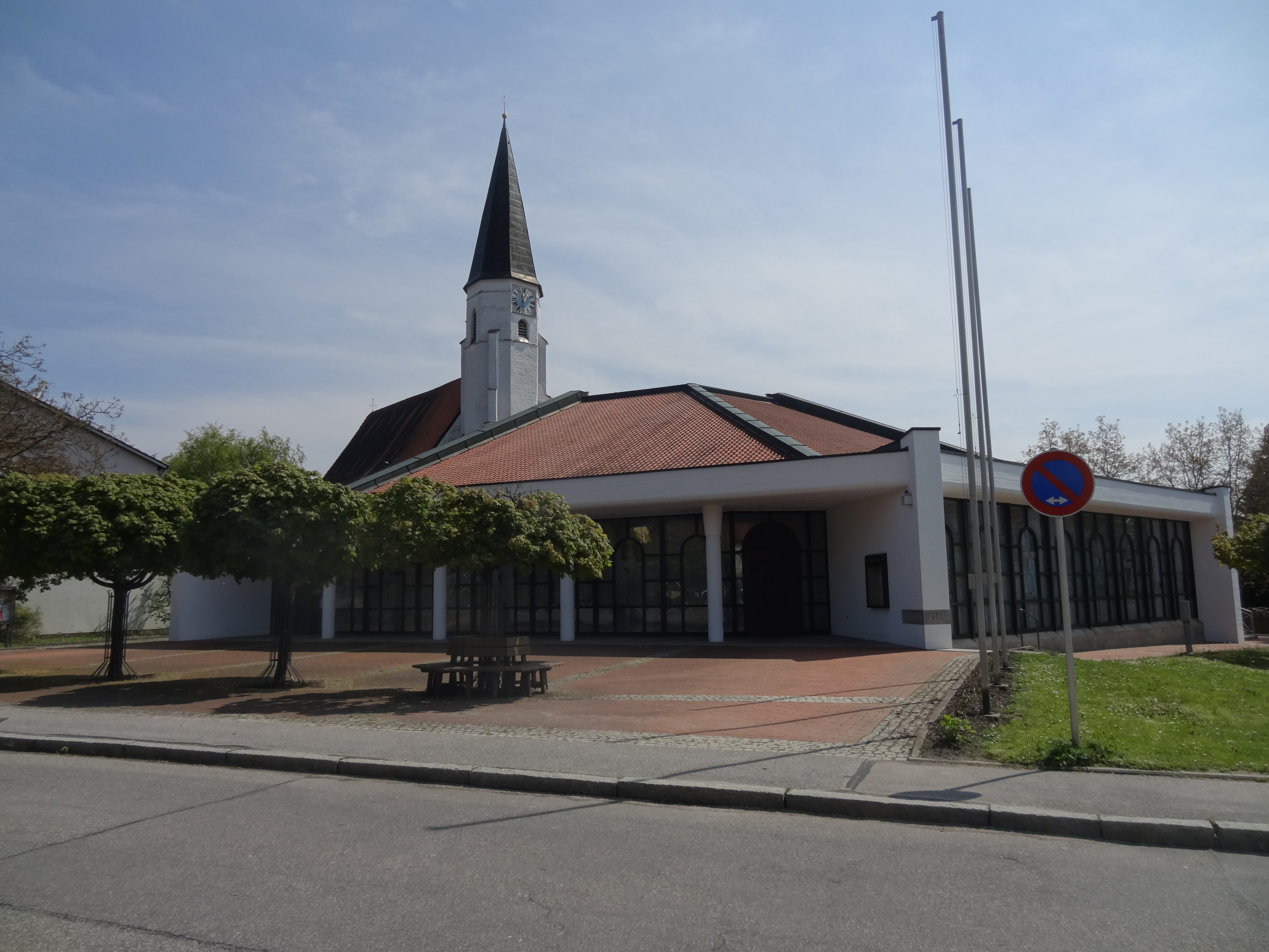 Außenansicht der Pfarrkirche Neu-St. Nikola in Altdorf (bei Landshut)